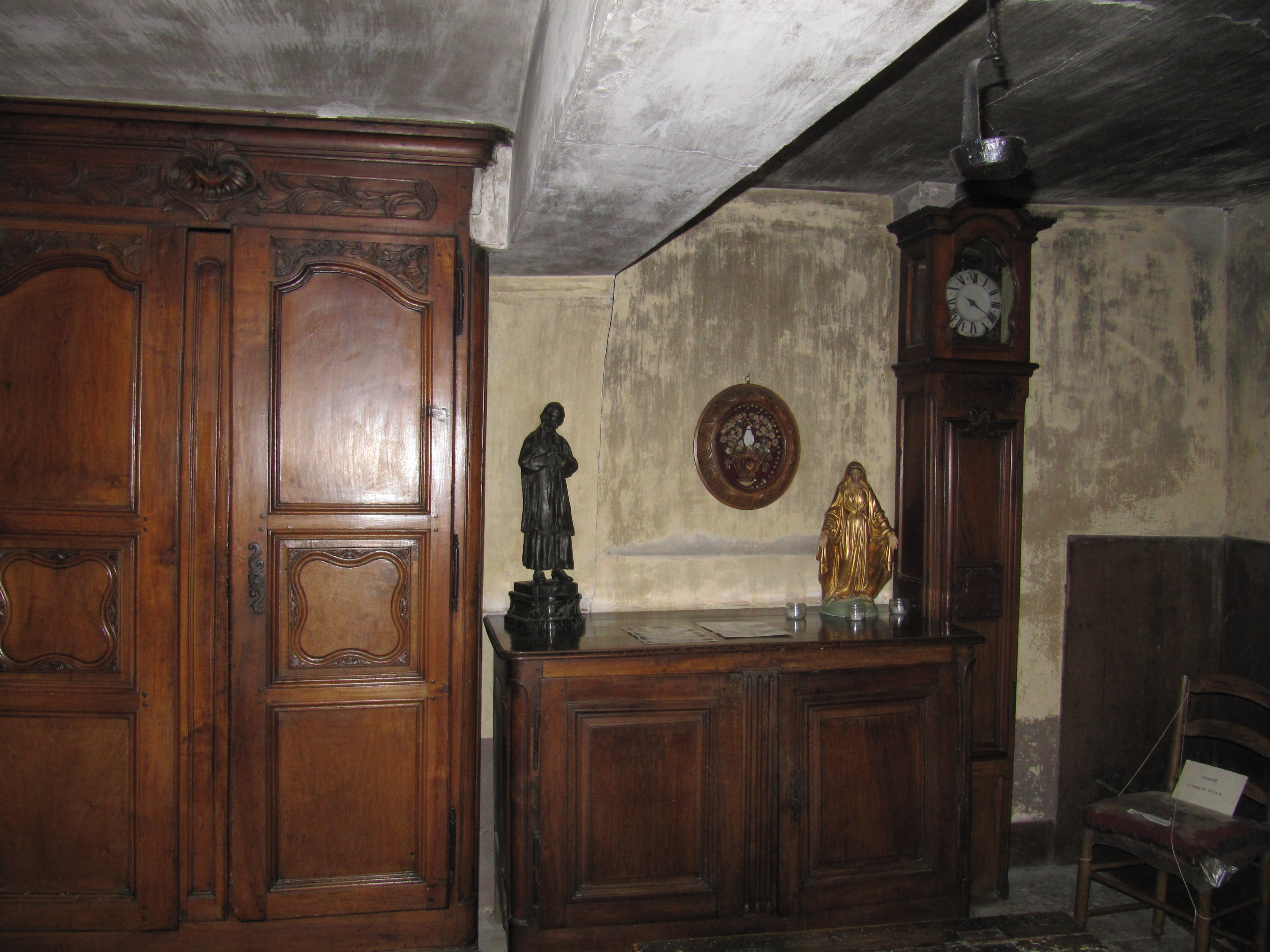 La Maison natale du Curé d'Ars